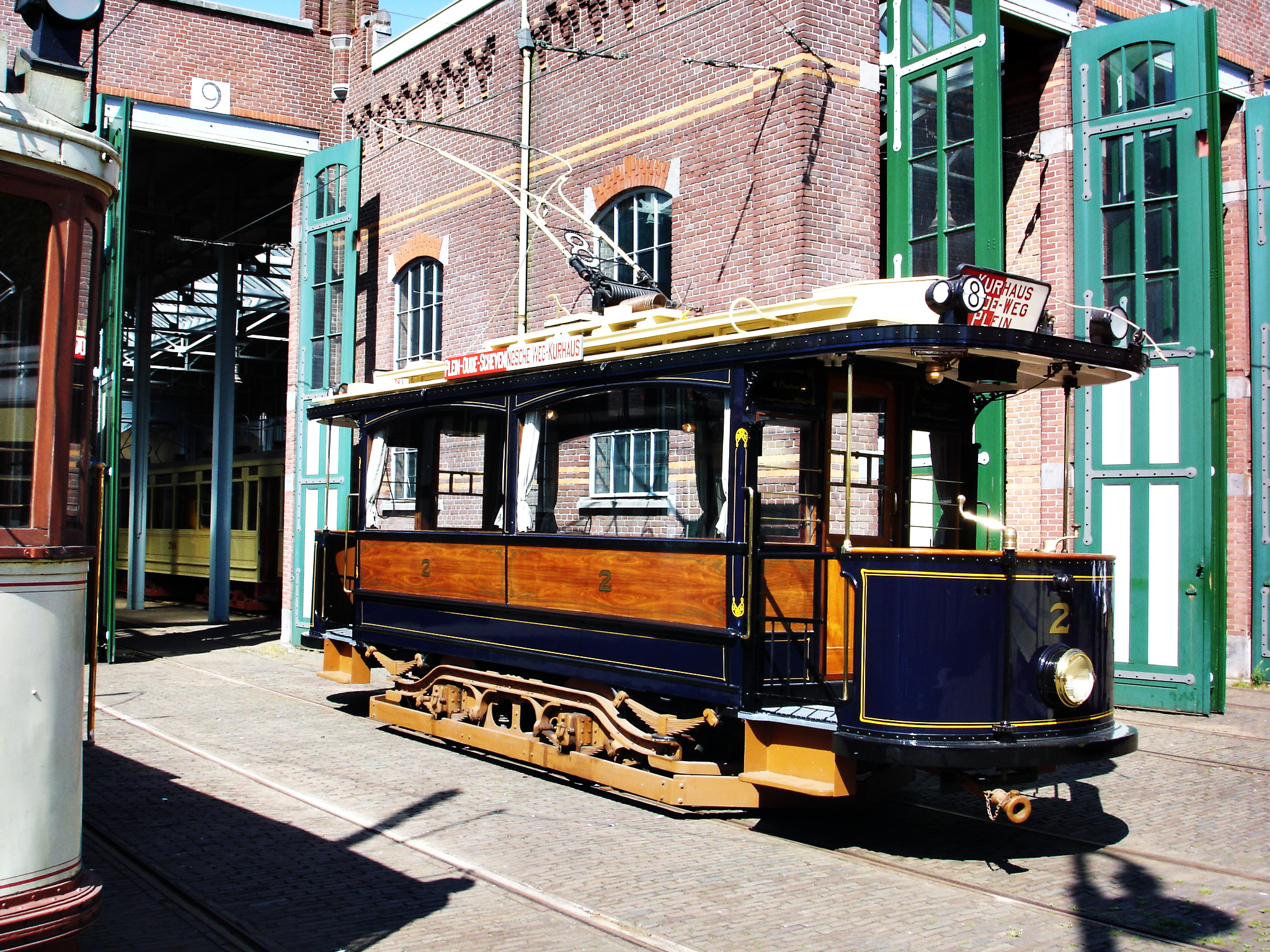 HTM museumtram/museum streetcar